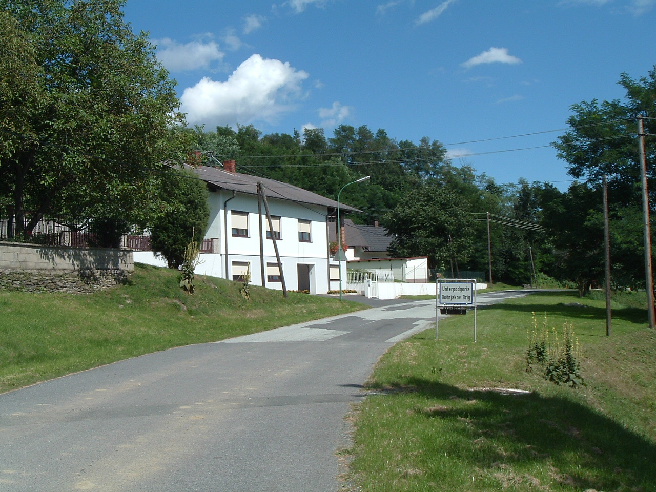 Unterpodgoria, Burgenland, Austria